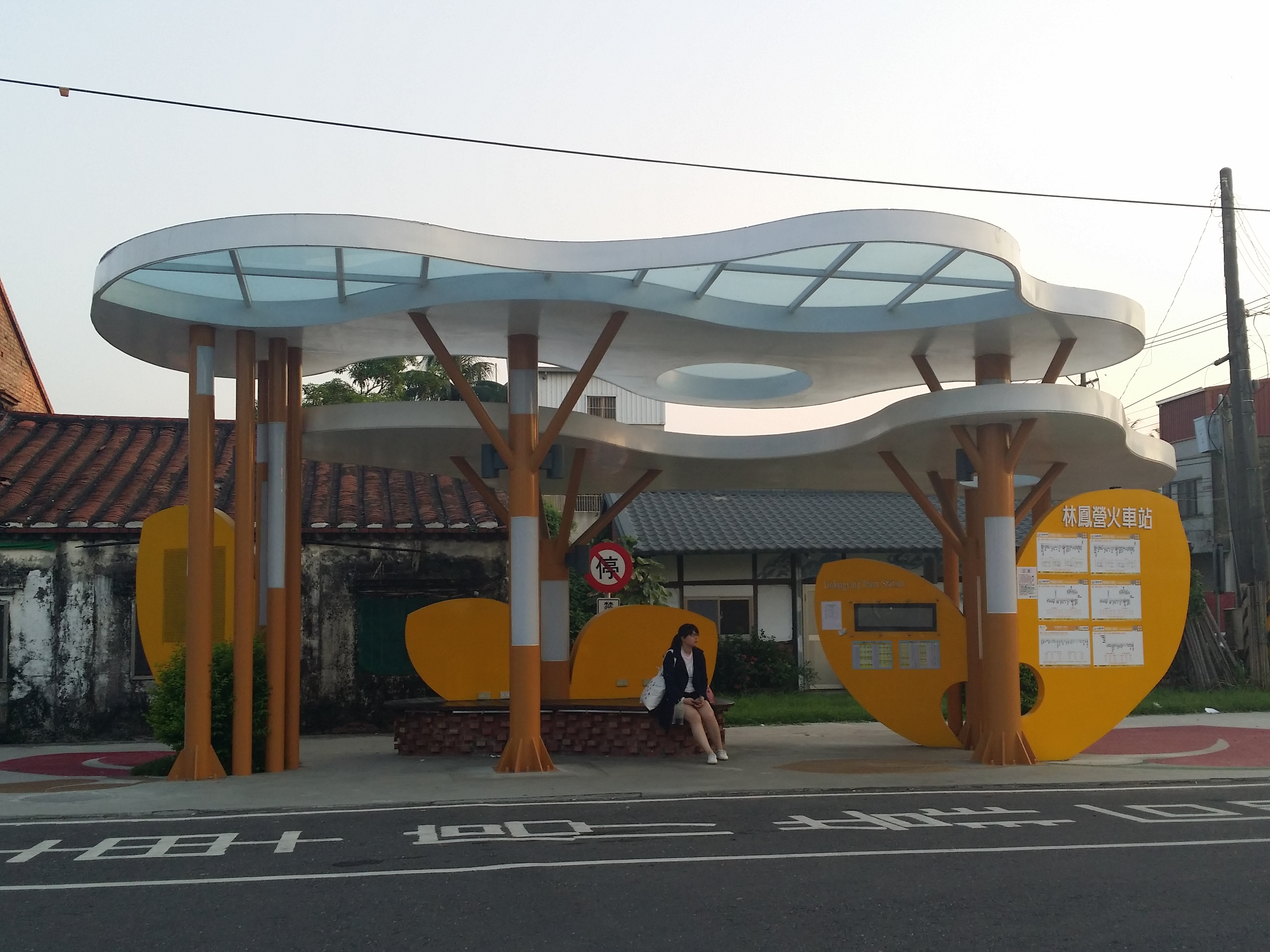 中文（台灣）: 臺灣鐵路管理局林鳳營車站前，大台南公車「林鳳營火車站」候車亭。